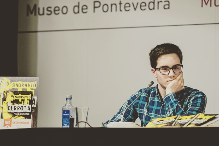 Marcus-Daniel Cabada en abril de 2016 en el Museo de Pontevedra.